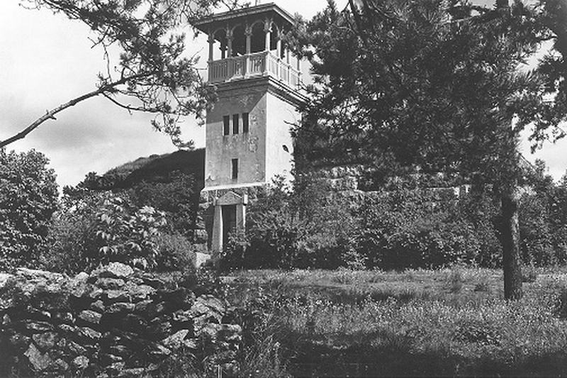 Водонапорная башня на горе Папуле в Выборге